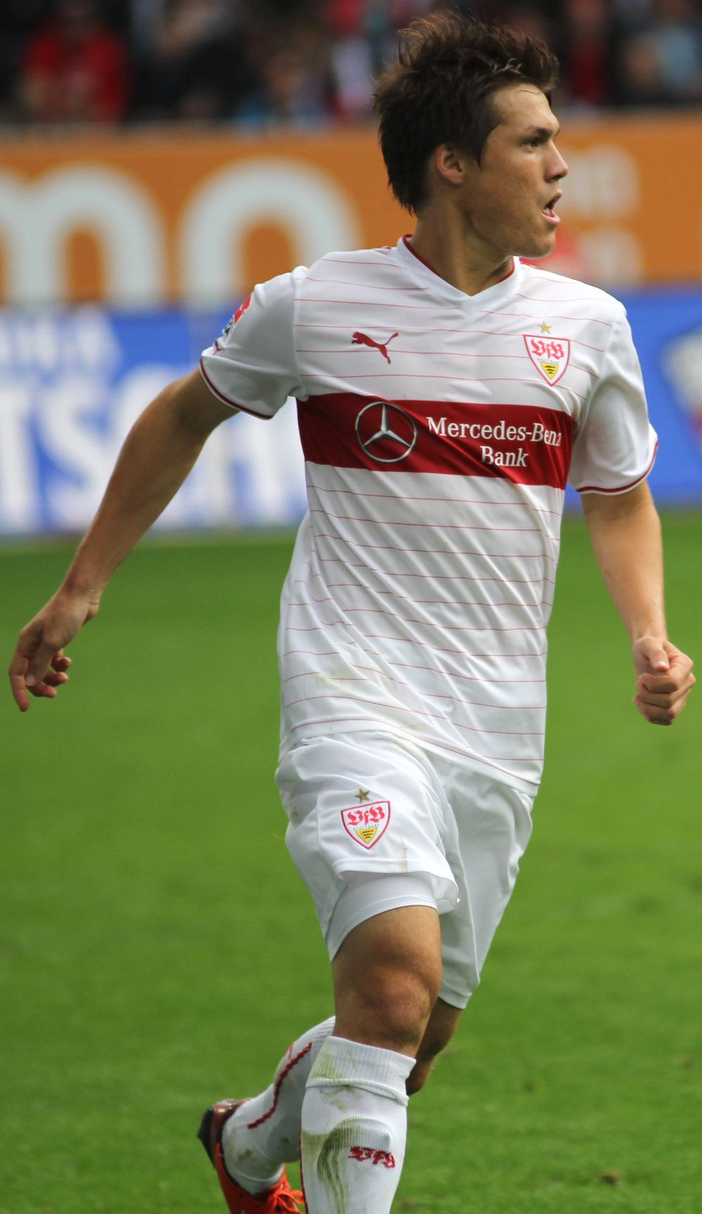 Gotoku Sakai beim Spiel FC Augsburg gegen VfB Stuttgart am 25.08.2013